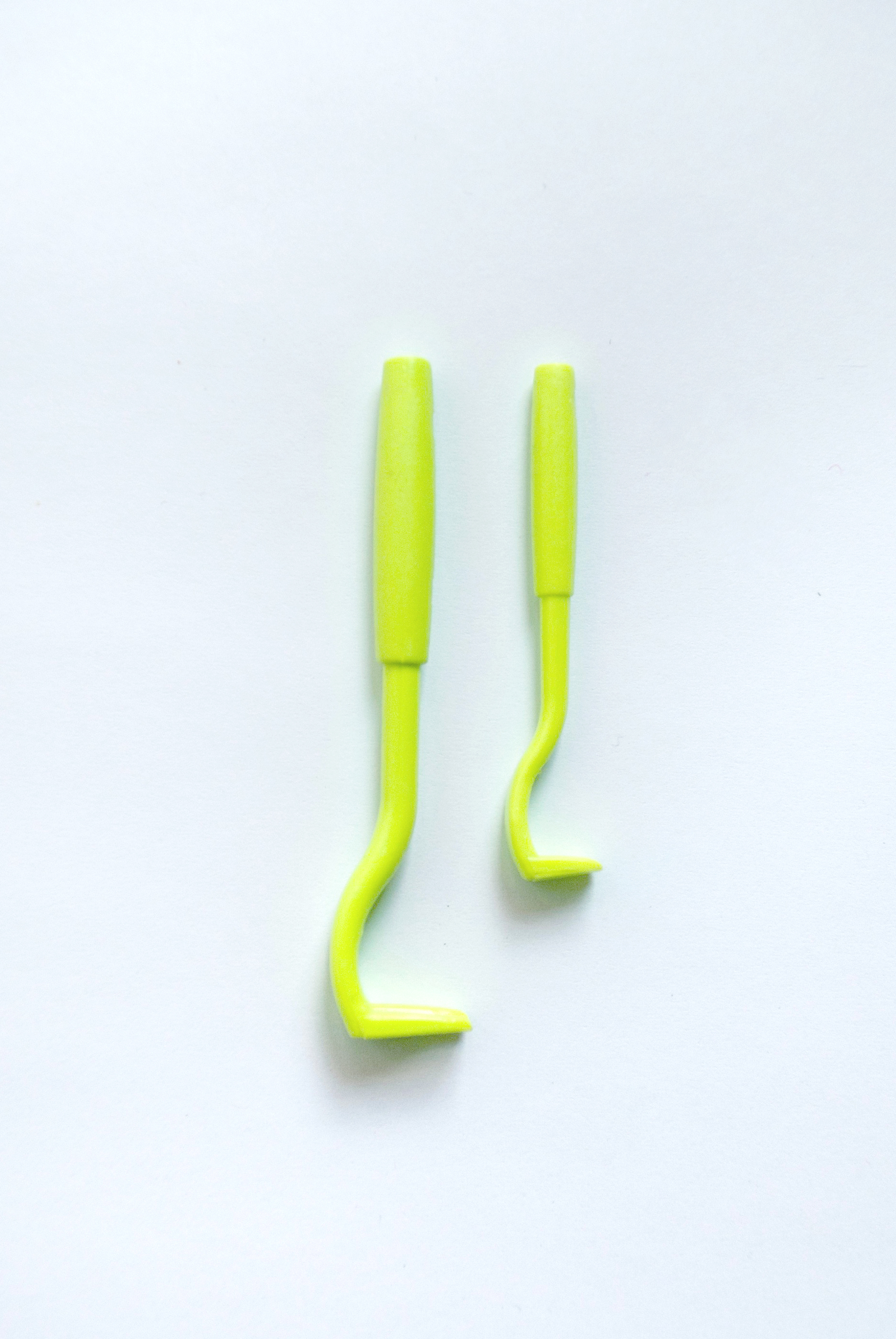 Twee tekentangen, één grote en één kleine.